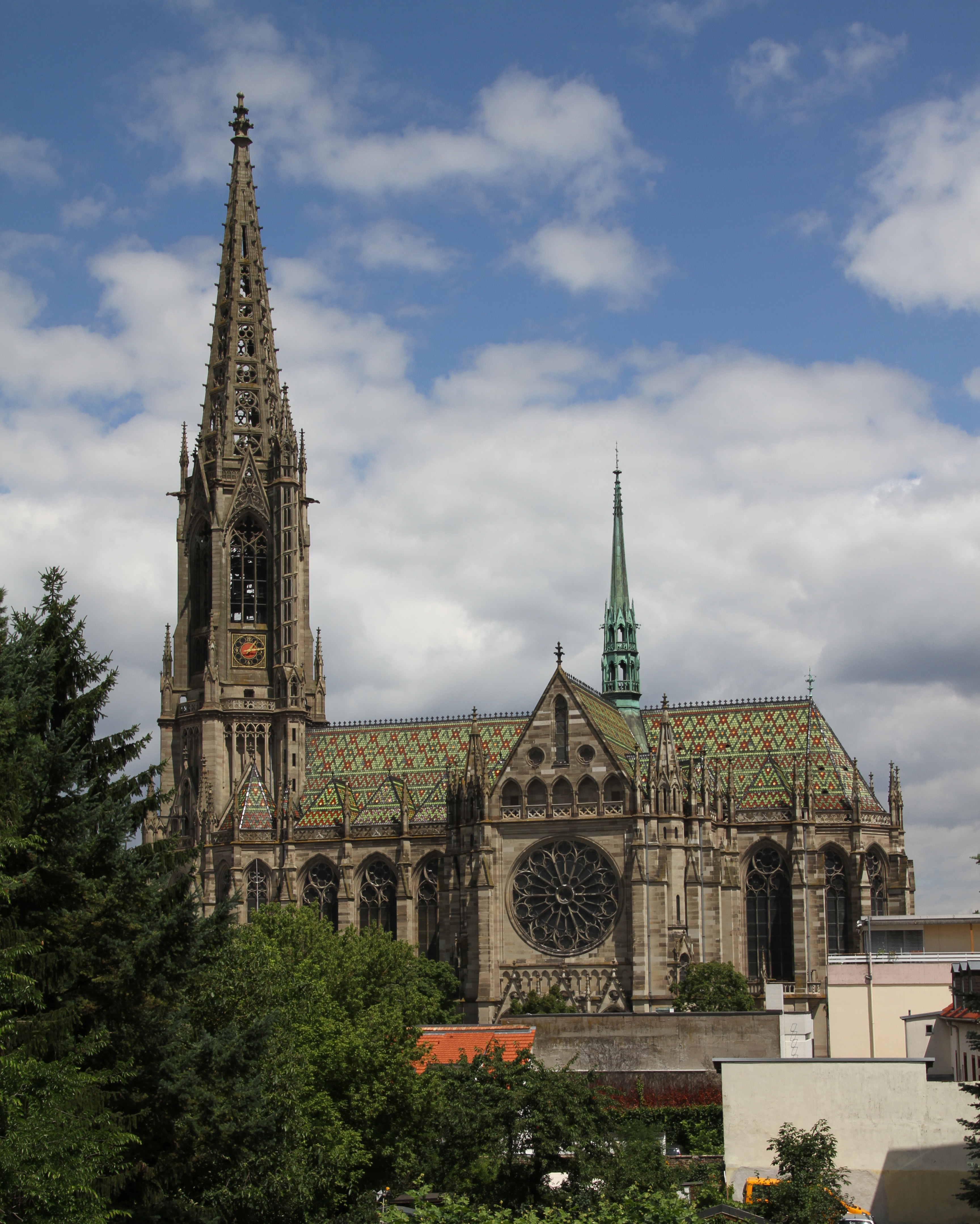 Speyer